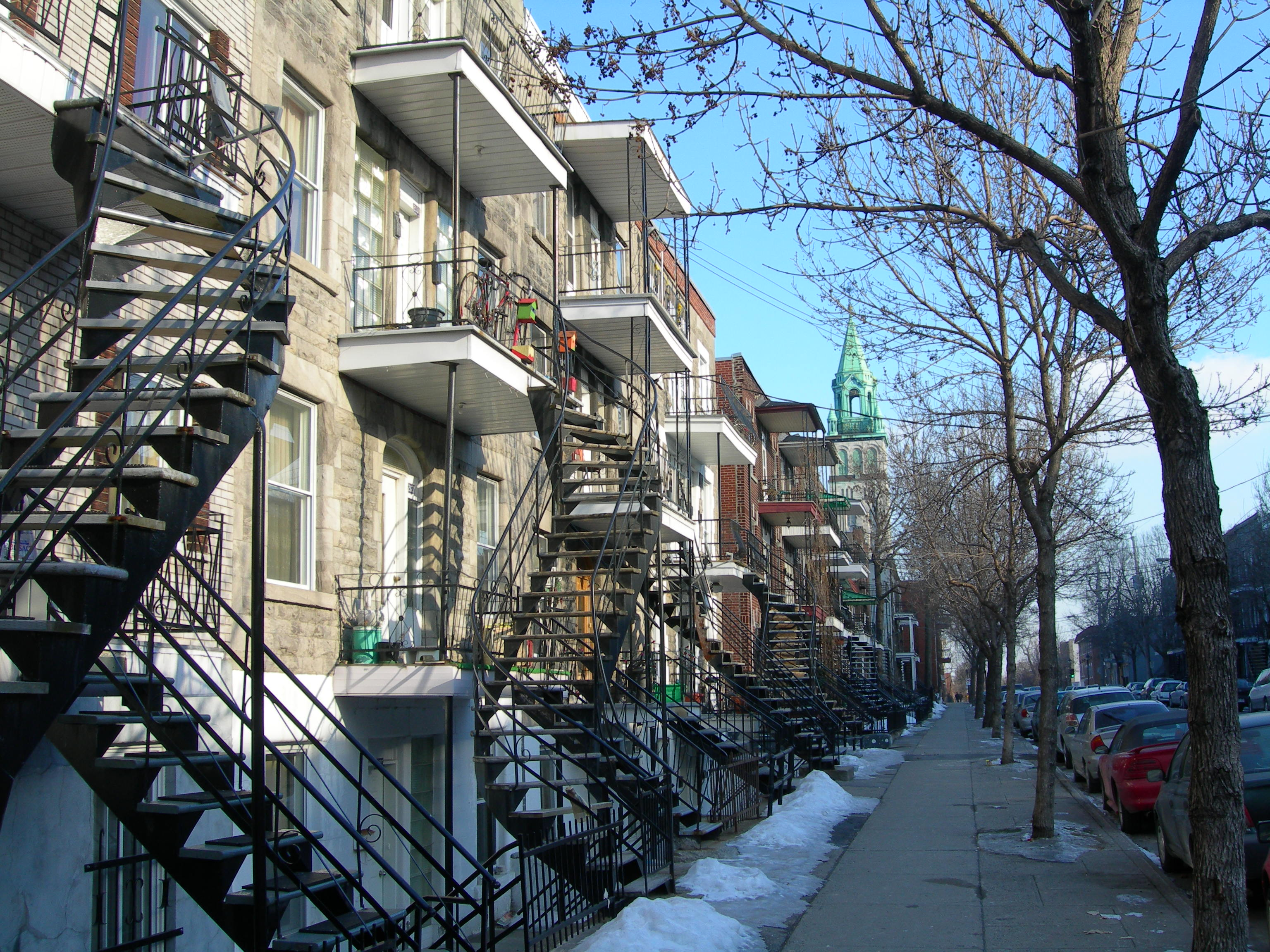 La rue Dézéry à Hochelaga-Maisonneuve (entre la rue De Rouen et la rue Ontario), Montréal